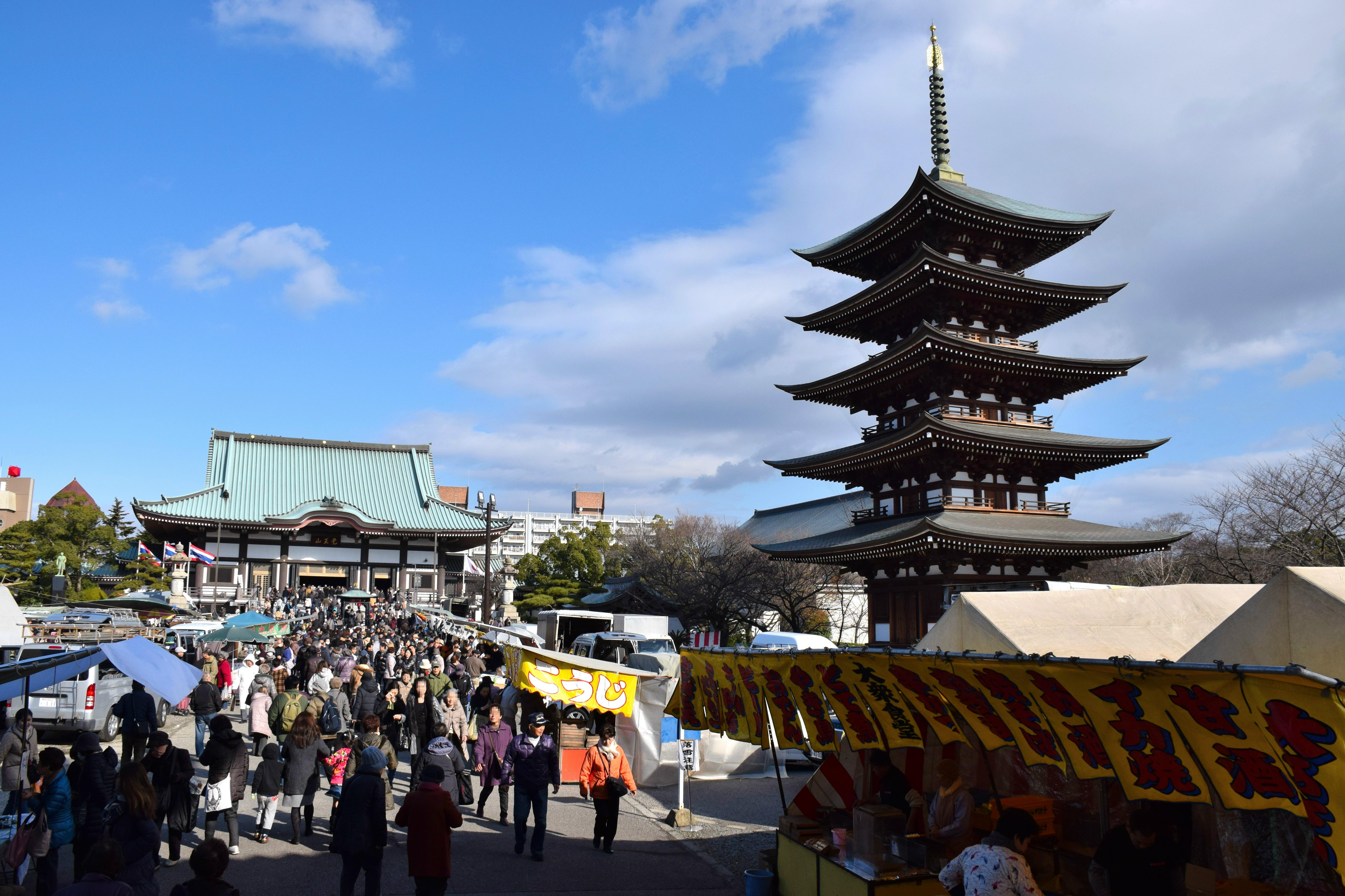 日泰寺縁日